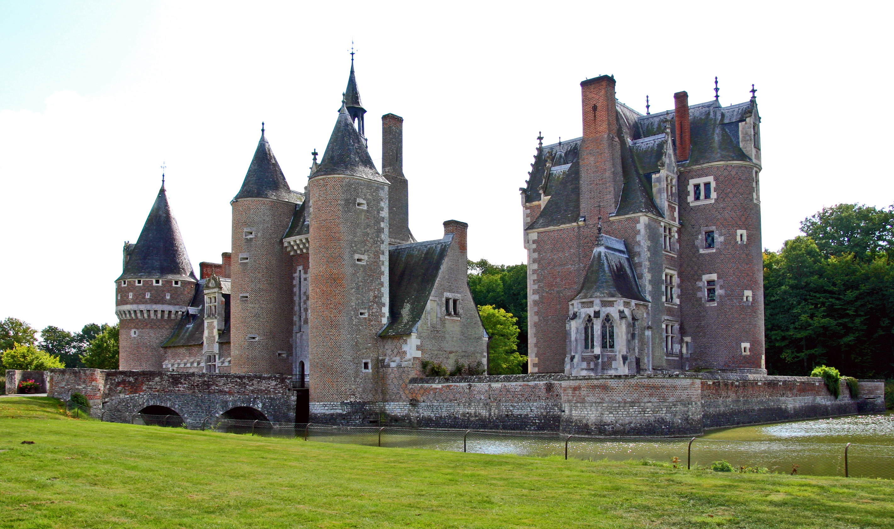 Schloss Le Moulin